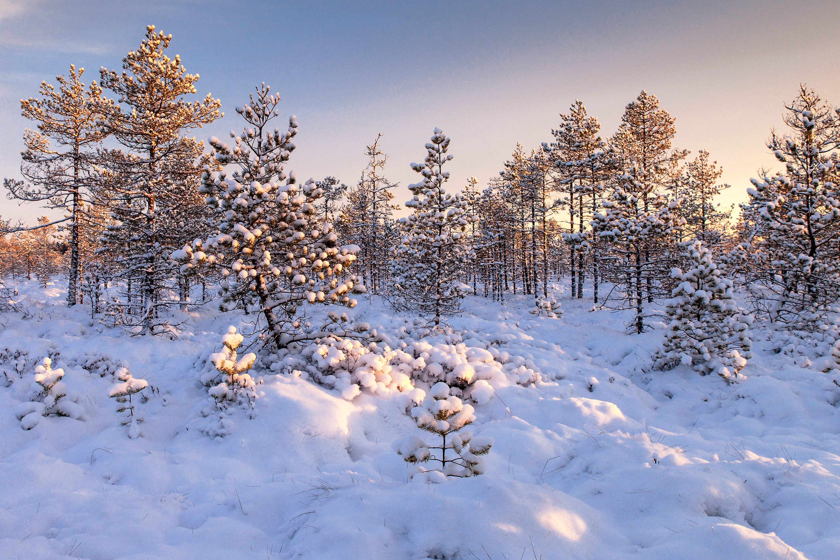 Valgesoo maastikukaitseala